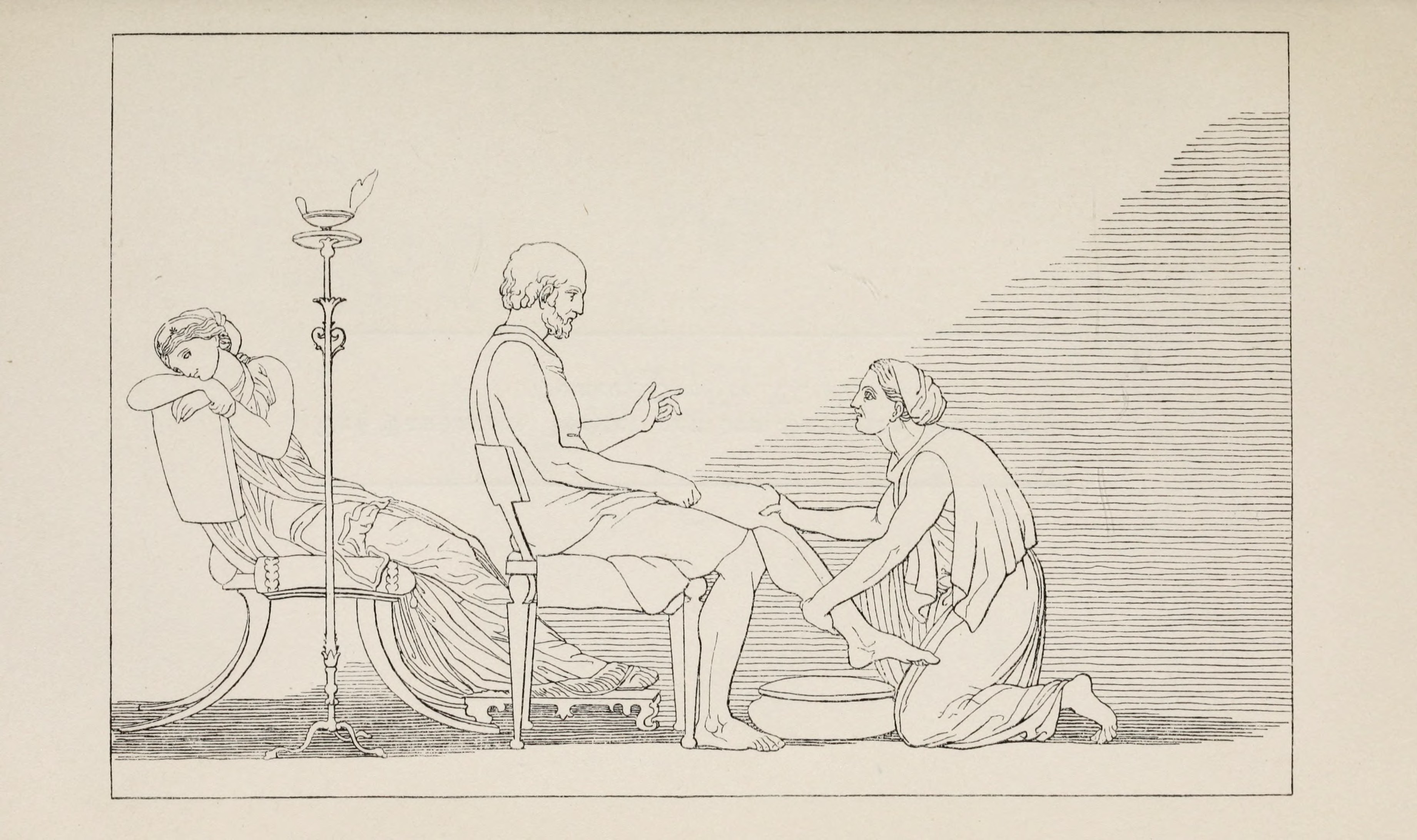 Odysseus von Eurykleia erkannt. – Homer, Odyssee XIX. 386. Schwab, Sagen des klassischen Altertums II. 343.